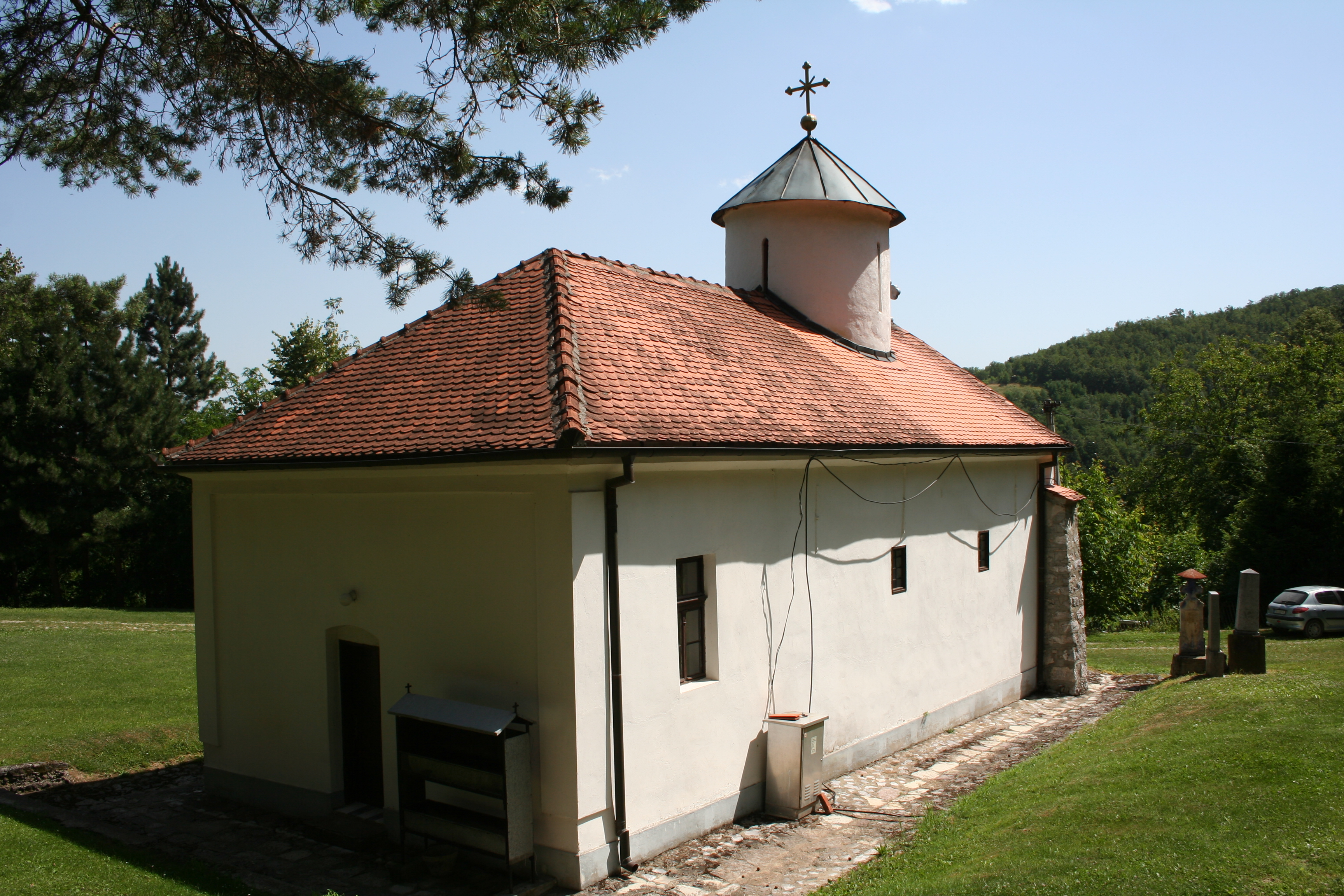 Crkva Sv. Nikole, Krčmar